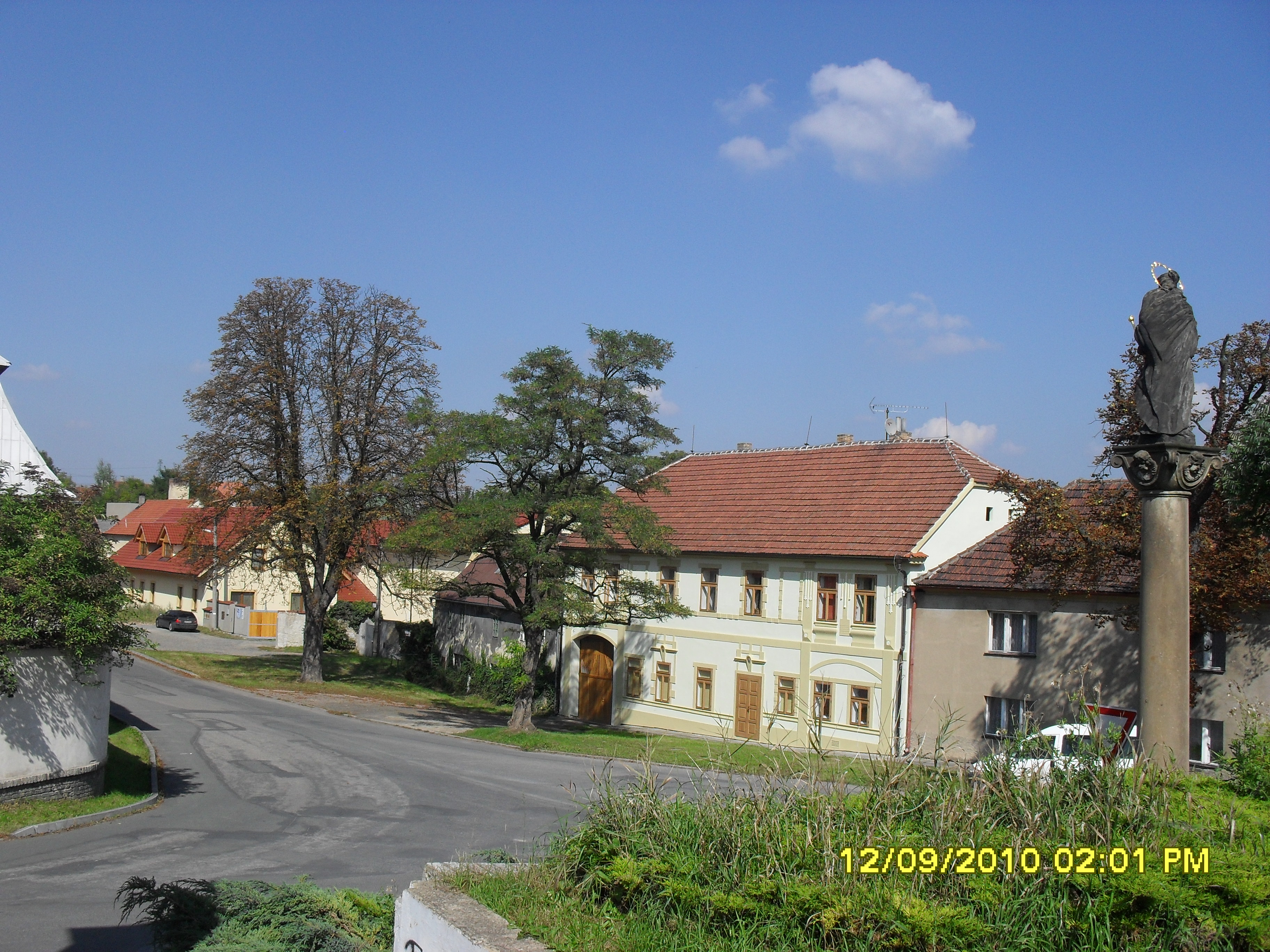 Náměstí v Buštěhradu.